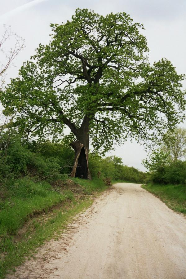 Das Wahrzeichen von Eichenthal ist diese vom Blitz ausgehöhlte Eiche am Wegesrand Richtung Eichenthal. Sie ist ein Überbleibsel des dichten Eichenwaldes aus der Besiedlungszeit Eichenthals im Jahre 1894 und war gleichzeitig die Namensgeberin für das Dorf "Eichenthal"